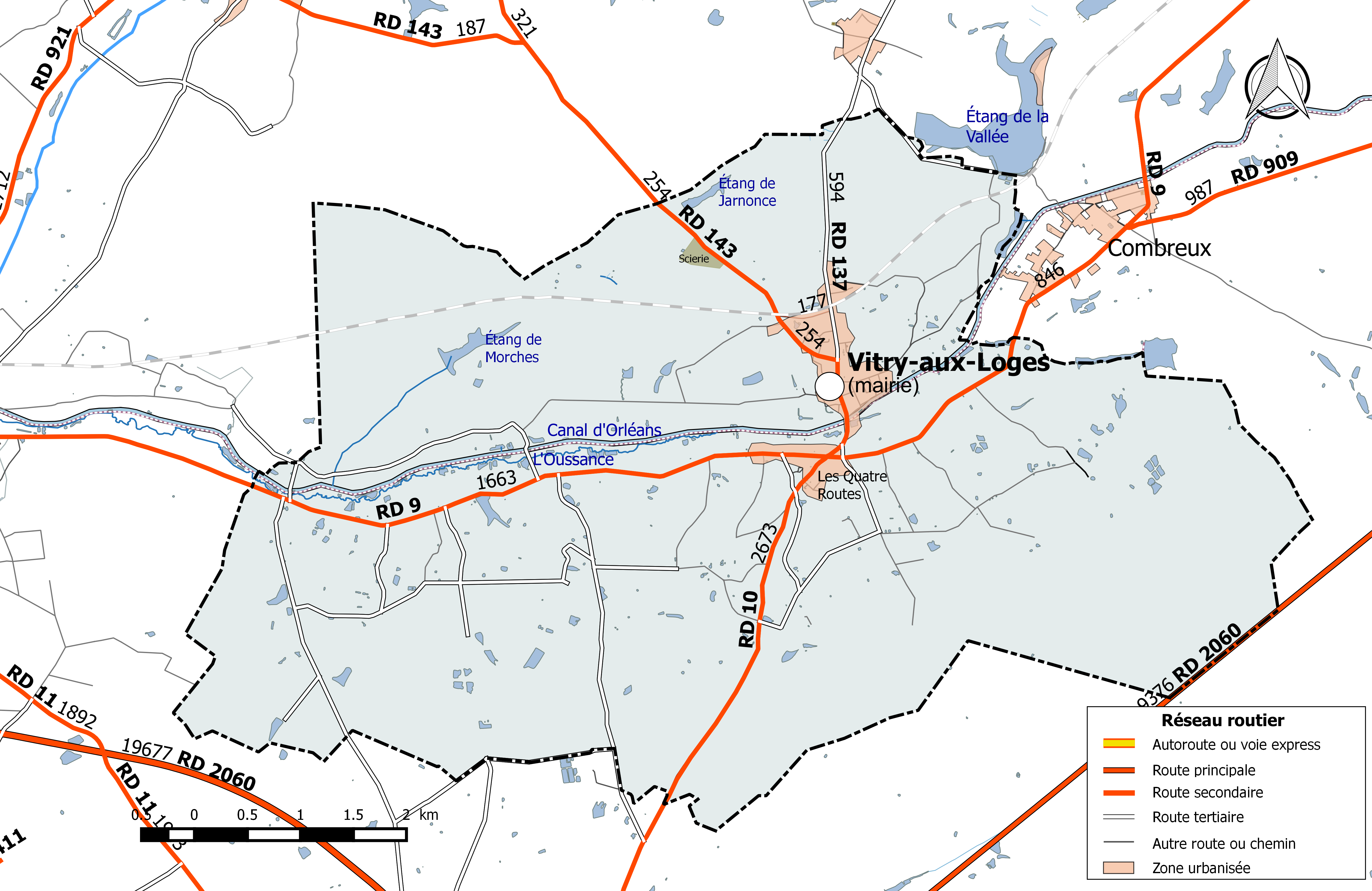 Carte du réseau routier de la commune de Vitry-aux-Loges.